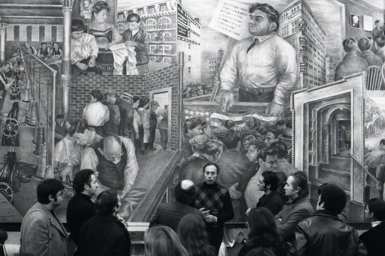 San Lazzaro di Savena? Studio di Ottorino Nonfarmale. Visita studenti Dams. Servizio fotografico : San Lazzaro di Savena, 1972 / Paolo Monti. - Strisce: 7, Fotogrammi complessivi: 38 : Negativo b/n, gelatina bromuro d'argento/ pellicola ; 35 mm. - ((Sul portanegativi: NIKMAT Agfa 400. - Tra i dipinti si è identificato: Guido Reni, Gesù Cristo in pietà pianto dalla Madonna e adorato dai Santi Petronio, Francesco, Domenico, Procolo e Carlo Borromeo (Pala dei Mendicanti), 1616, olio su tela, particolari. - Fonte: Agenda di Paolo Monti: Leica 1501-3000 Controllo numerazione (1950-1978), presso Archivio Paolo Monti. Fattura contenuta nel faldone n. IV denominato "Commesse". - Fonte: Agenda di Paolo Monti: Monti - Agenda 1972 (1972/02/19), presso Archivio Paolo Monti. In data 19 febbraio annotazione manoscritta da Monti: "Università/ interdisciplinare con Cervellati e Emiliani/ da Nonfarmale".